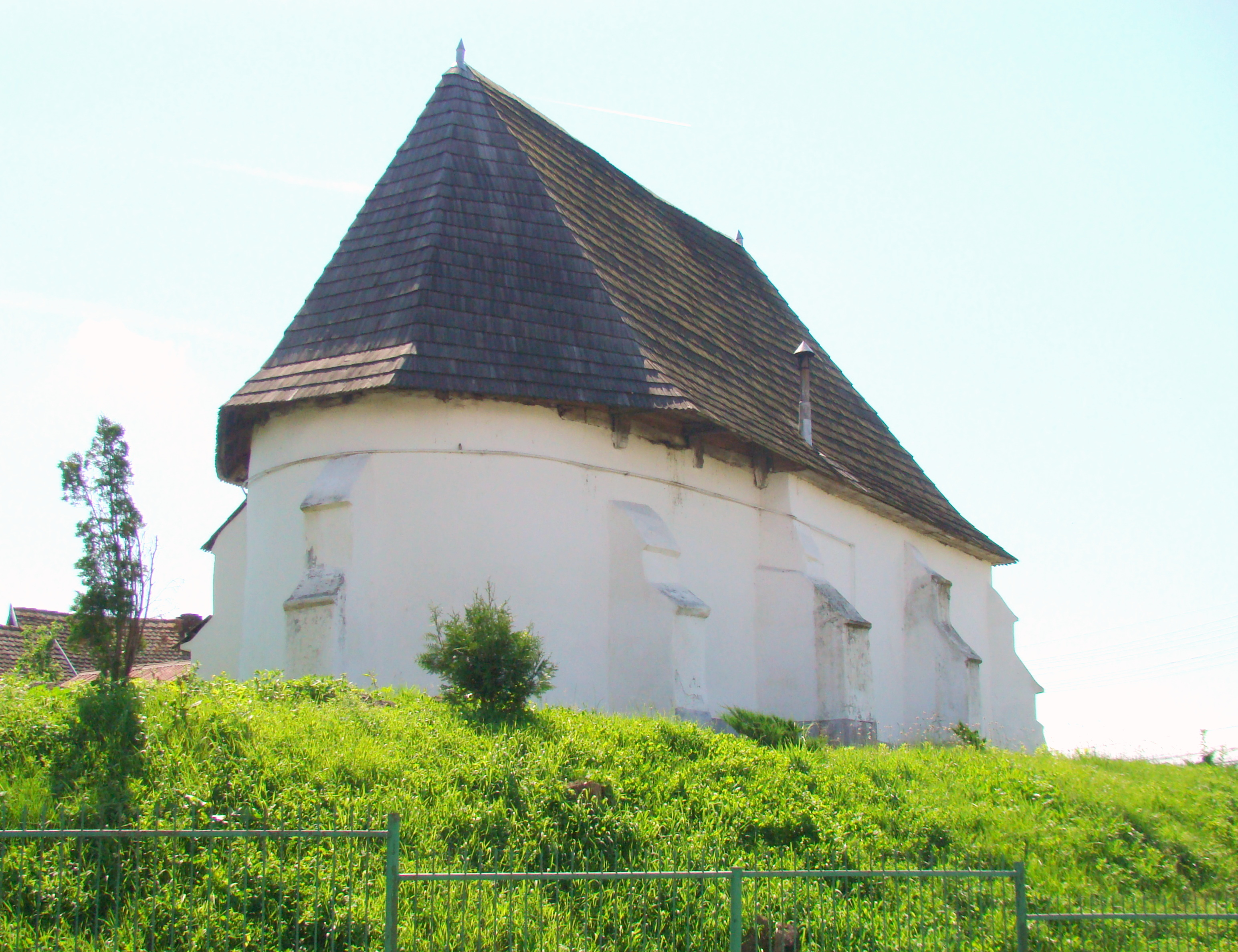 Biserica reformată, sat Agrișteu; comuna Bălăușeri, judeţul Mureş 01